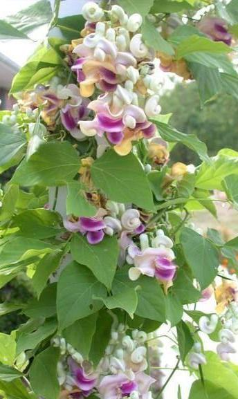 Corkscrew Vine (Vigna caracalla) blooms